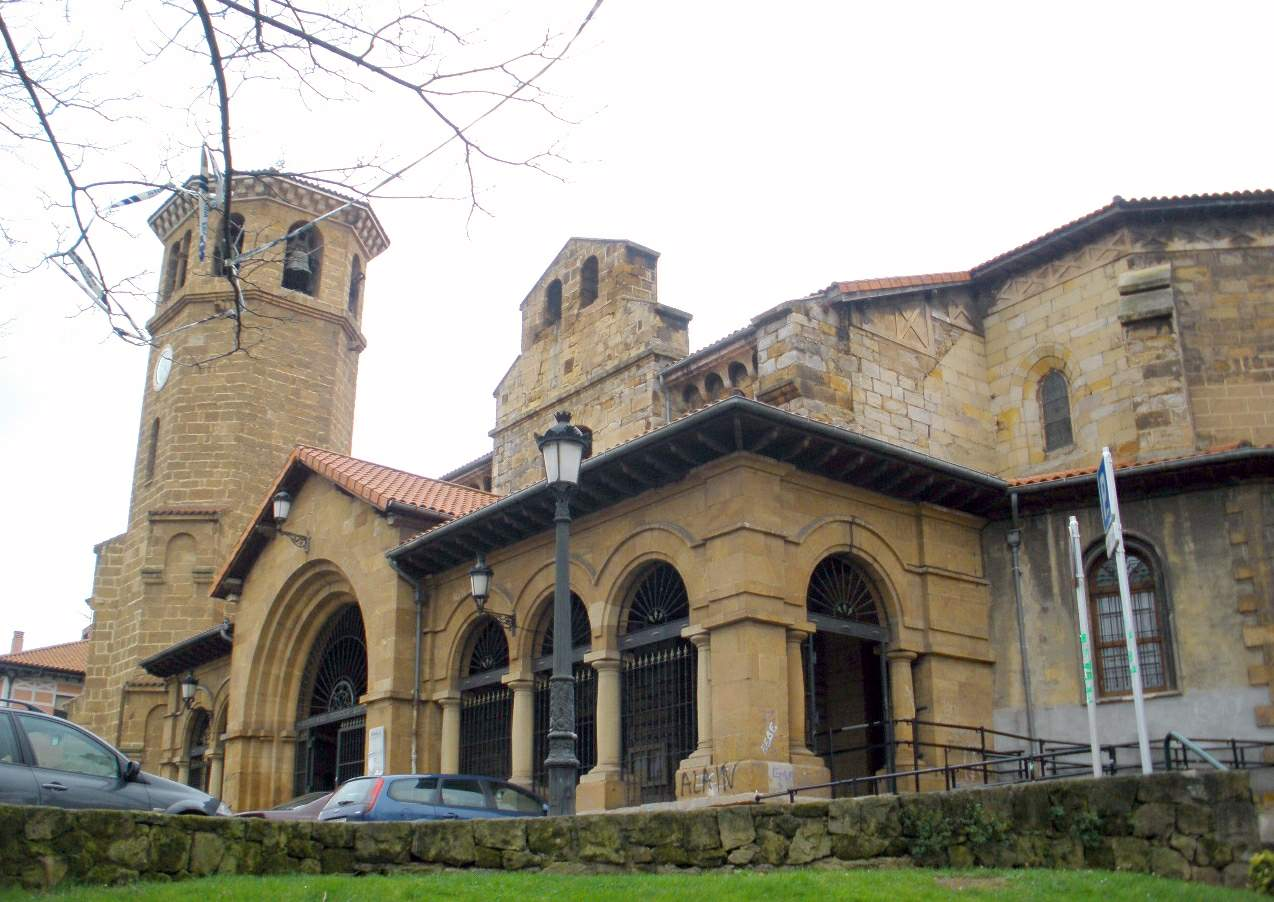 Iglesia de Santa María, Sestao (Bizkaia)